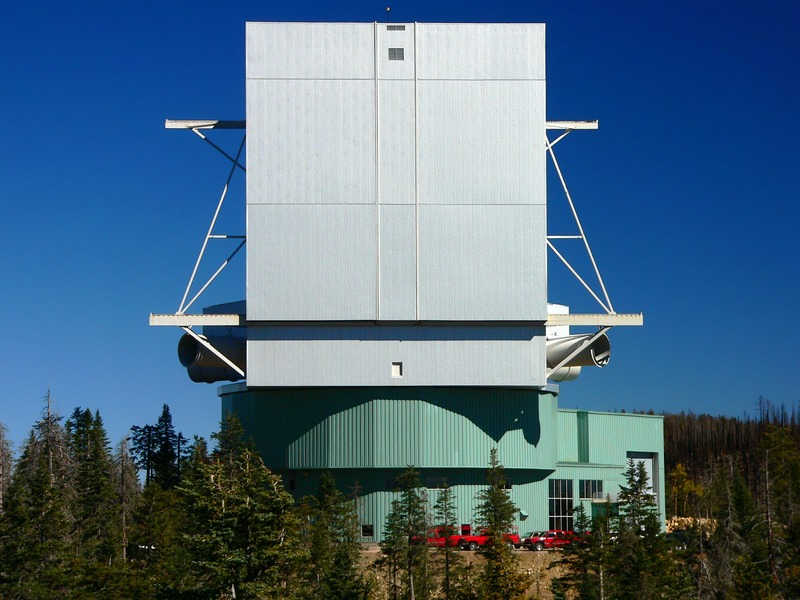 Gebäude des Large Binocular Telescope, Leibniz-Institut für Astrophysik Potsdam - R. Arlt